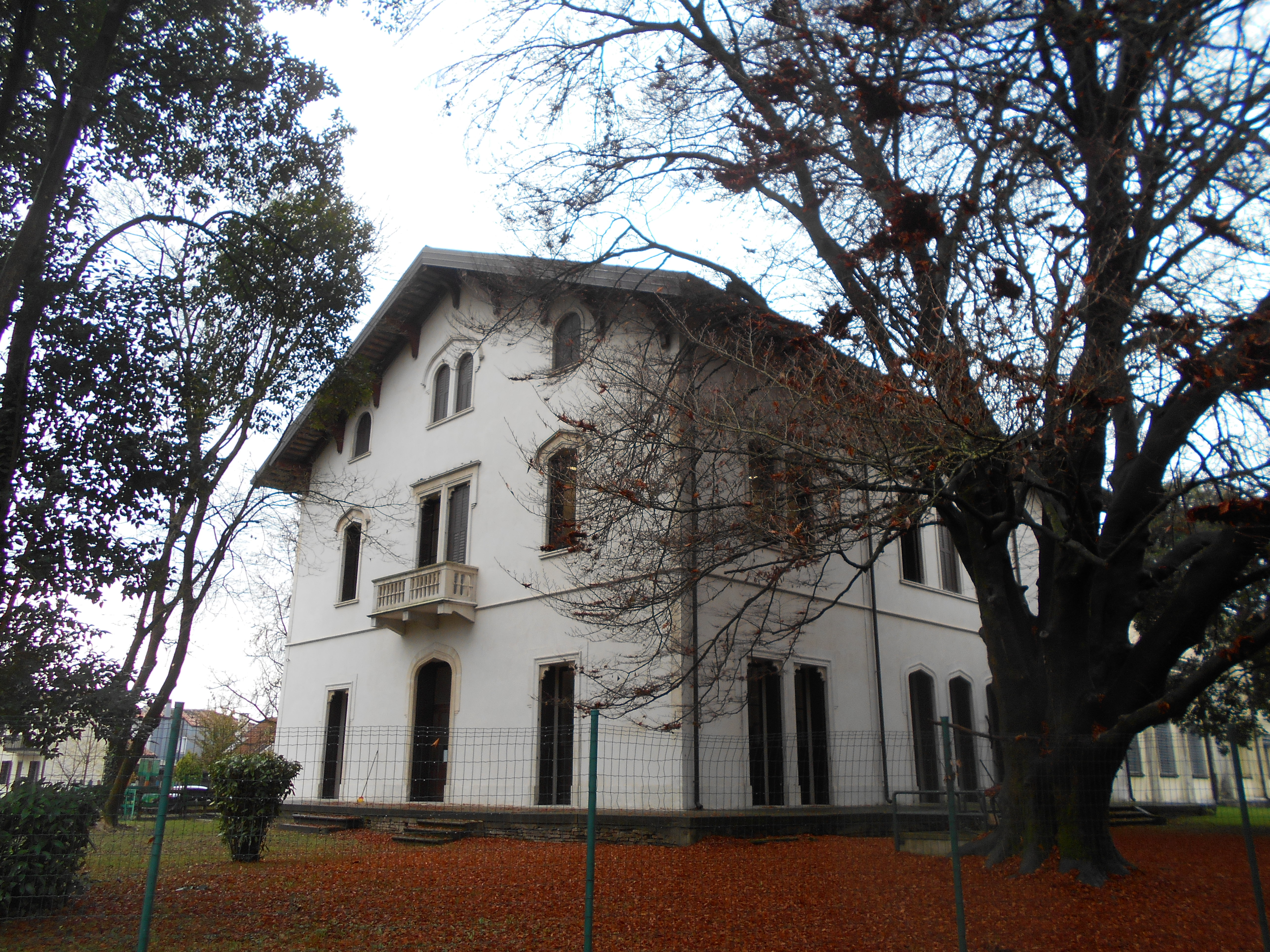 Scuola Stefanini di Voltabarozzo